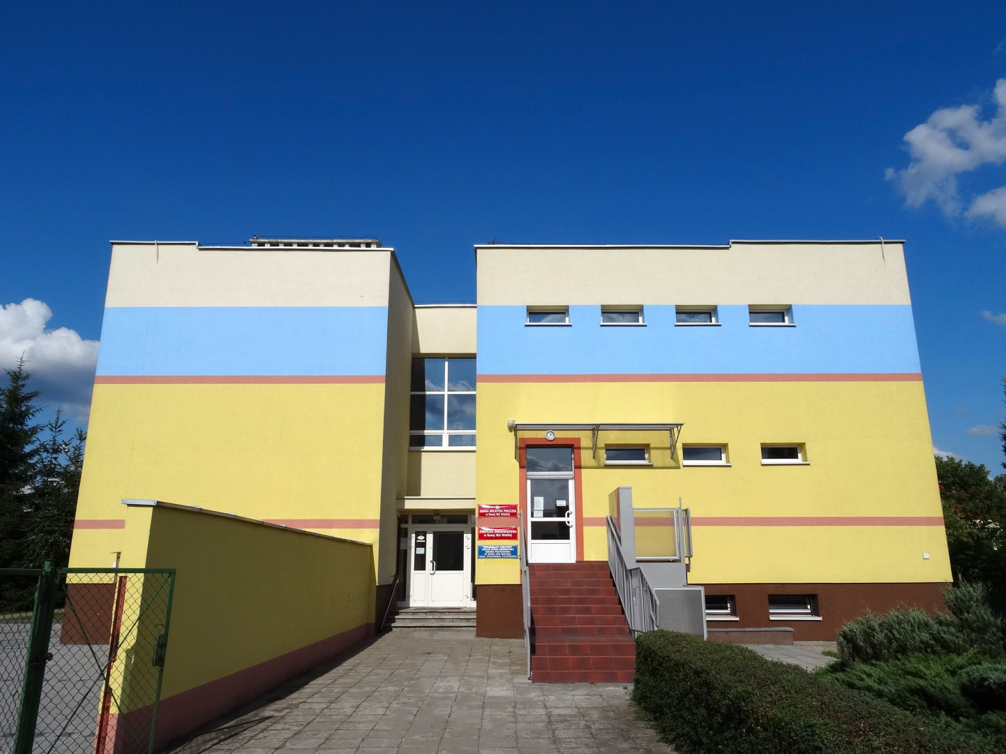 Budynek, w którym mieści się: Gminna Biblioteka Publiczna, Świetlica Środowiskowa oraz Gminna Przychodnia Zdrowia w Nowej Wsi Wielkiej, powiat bydgoski